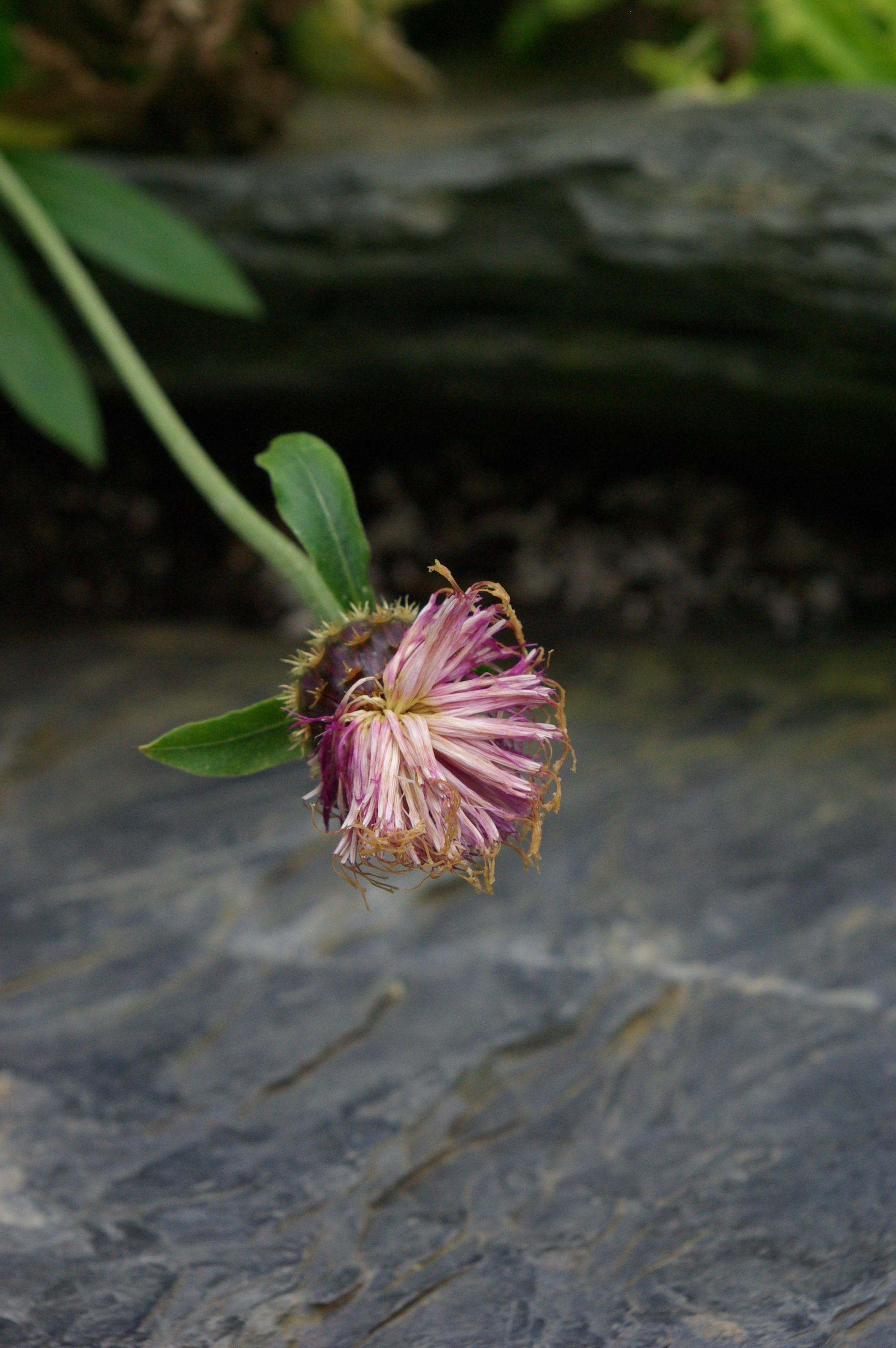 Fleur fanée de Cheirolophus massonianus au Conservatoire botanique national de Brest.